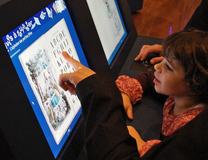 Exposition "Babar, Harry Potter et Cie" à la BnF